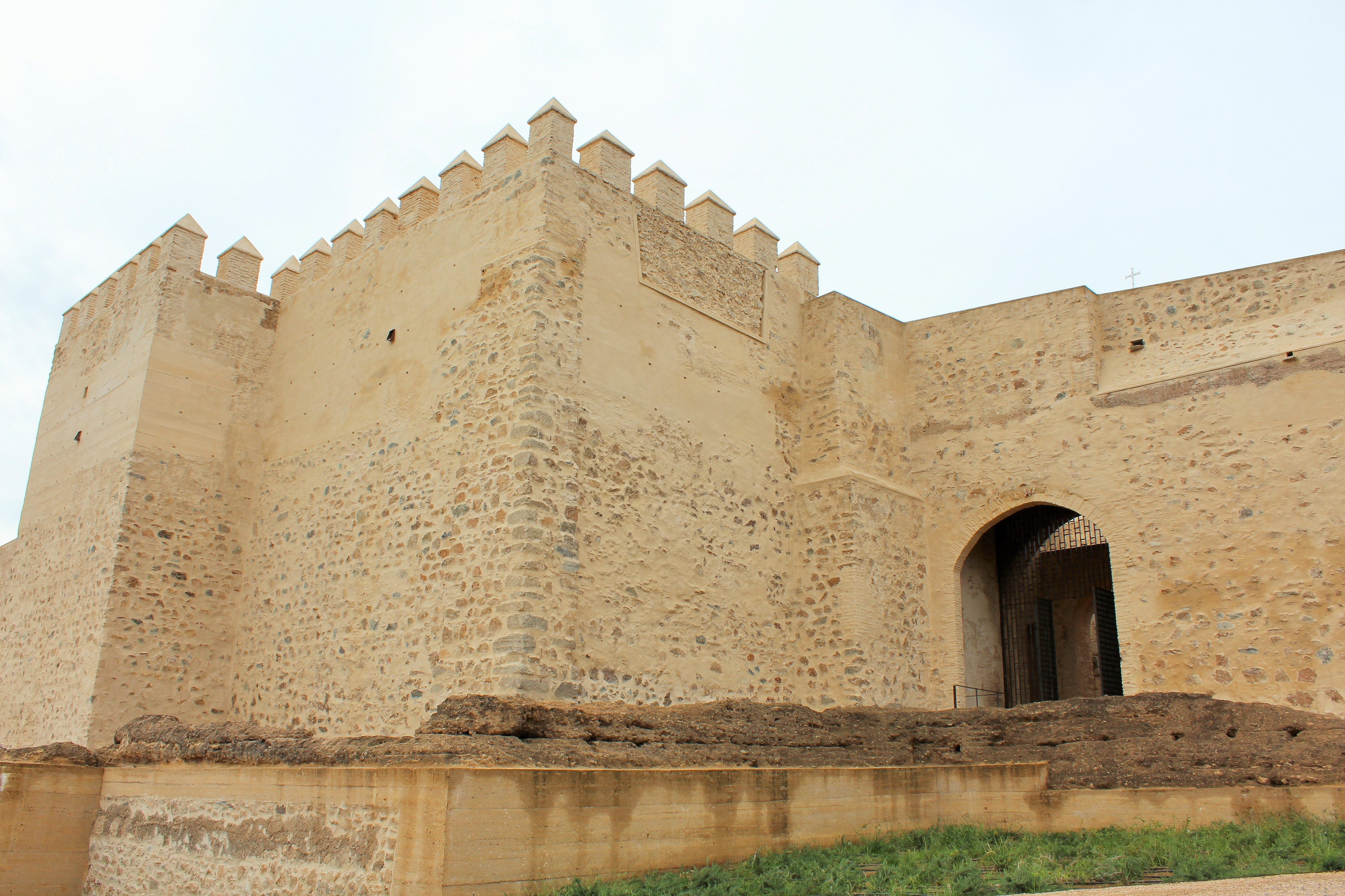 Lienzos nor-este.